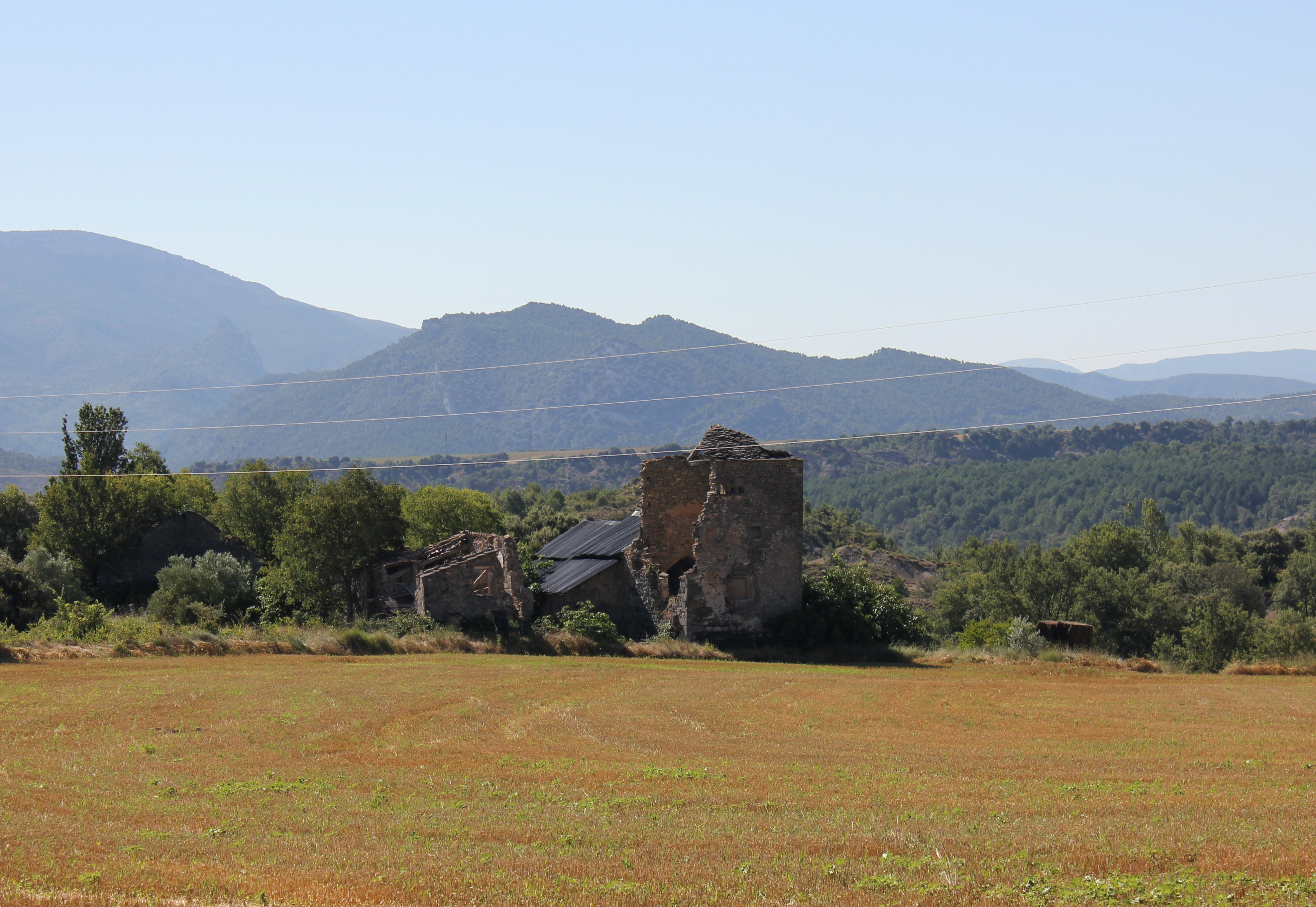 Aragonés: Enrunas de a ilesia de Sant Chusé (s. XVI), en a Torre, y a casa fuerte que l'acompanyaba.